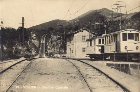 Ferrovia vesuviana stazione Vesuvio